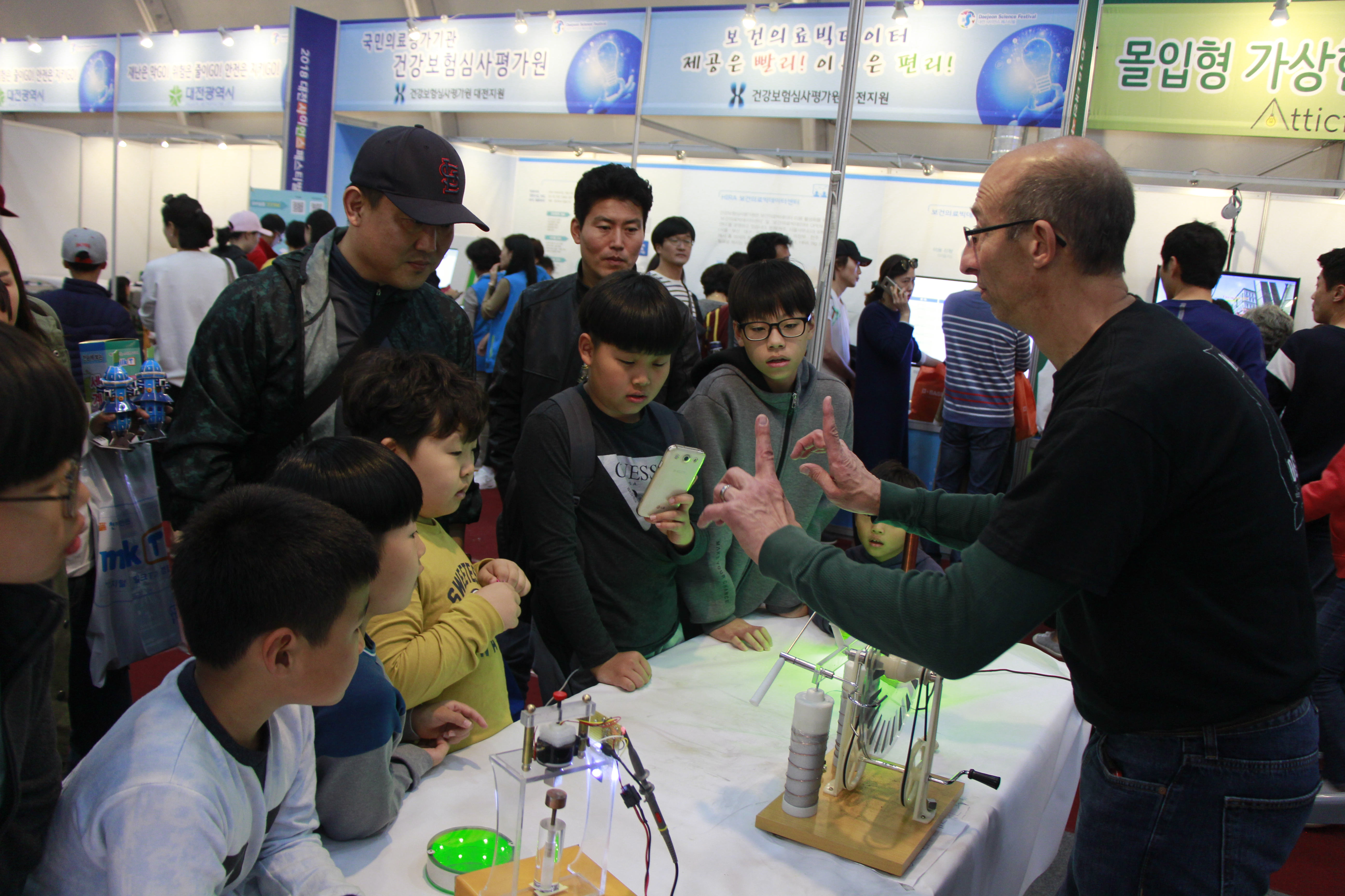 2018 대전사이언스페스티벌